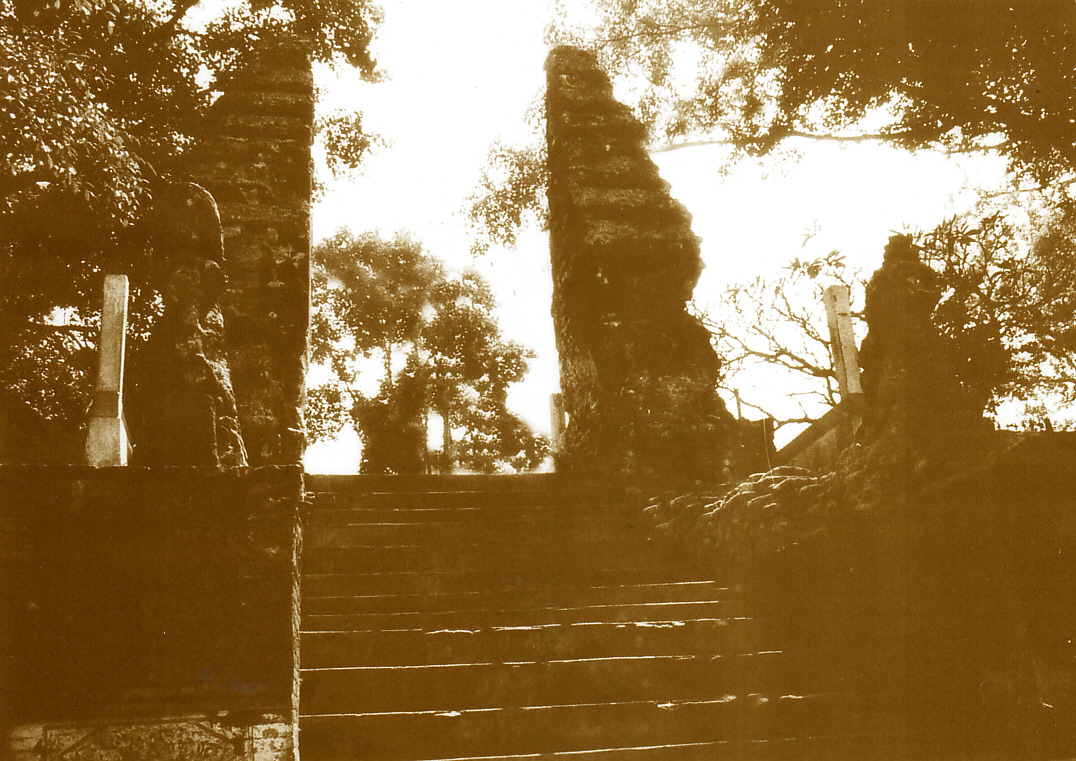 Gapura Naga sebagai pertanda memasuki wilayah Giri Kedaton. Kini menjadi penanda memasuki kompleks makam Sunan Giri